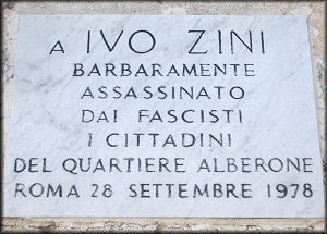 Targa commemorativa a Roma, all' entrata della sezione dell' Alberone, intitolata a Ivo Zini